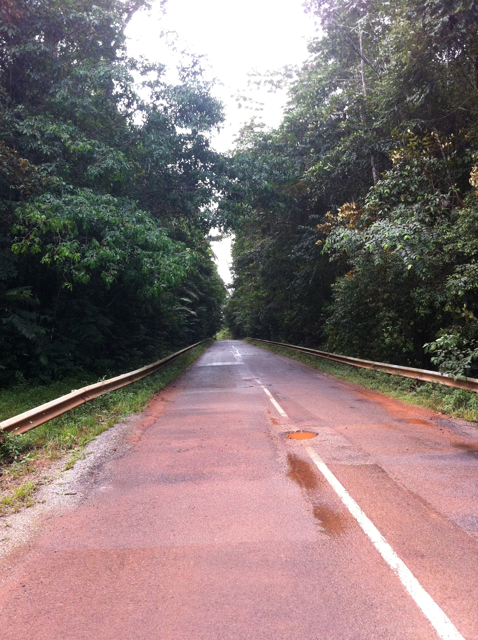 Passage écologique sur la route nationale 2 entre Cayenne et Saint Georges de l'Oyapock ; la DIREN et la DDE ont fait en sorte lors de la construction de la route que conserver des zones (mesures conservatoires) où la canopée et restée aussi "jointive" que possible. Car la plupart des espèces non volante de la forêt humide équatoriale fuient les milieux ouverts et non-végétalisés. Et Certaines espèces ne descendent même jamais au sol. Pour celles-ci une route est un puissant facteur de fragmentation forestière. Le réseau routier de la Guyane n'a bénéficié d'aucun écoduc, mais plusieurs passages de ce type ont été conservés sur le parcours de la RN2, permettent à de nombreux différents animaux de la traverser moins difficilement.